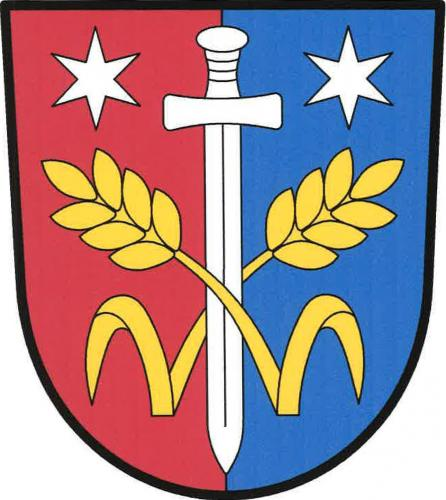 Třebovle znak